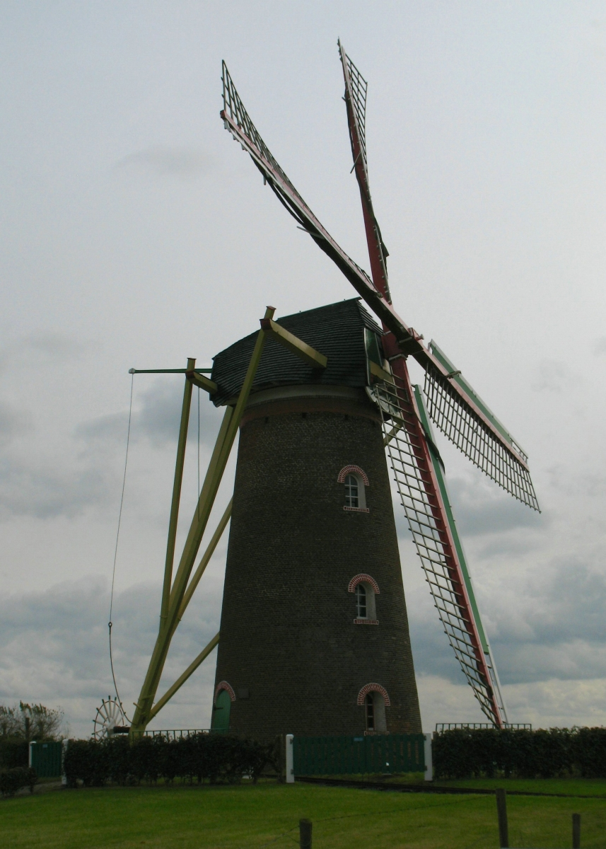 Vogelzicht, Kuitaart, Zeeland, stellingmolen